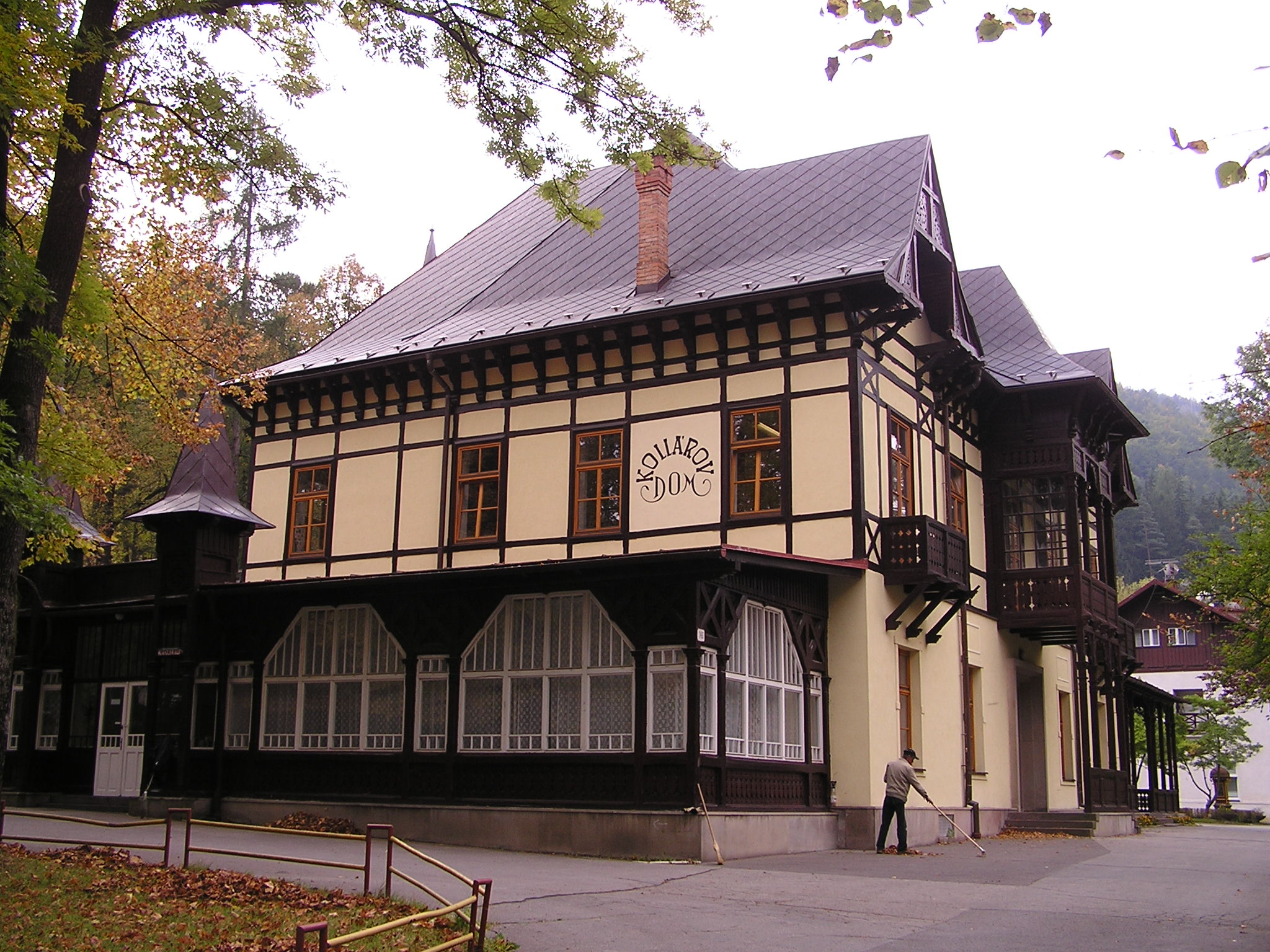 Dom kúpeľný, Kollárov dom, Ľubochňa, okres Ružomberok.